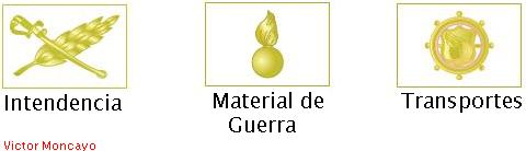 Las insignias de los Servicios del Ejercito del Ecuador author: Victor Moncayo